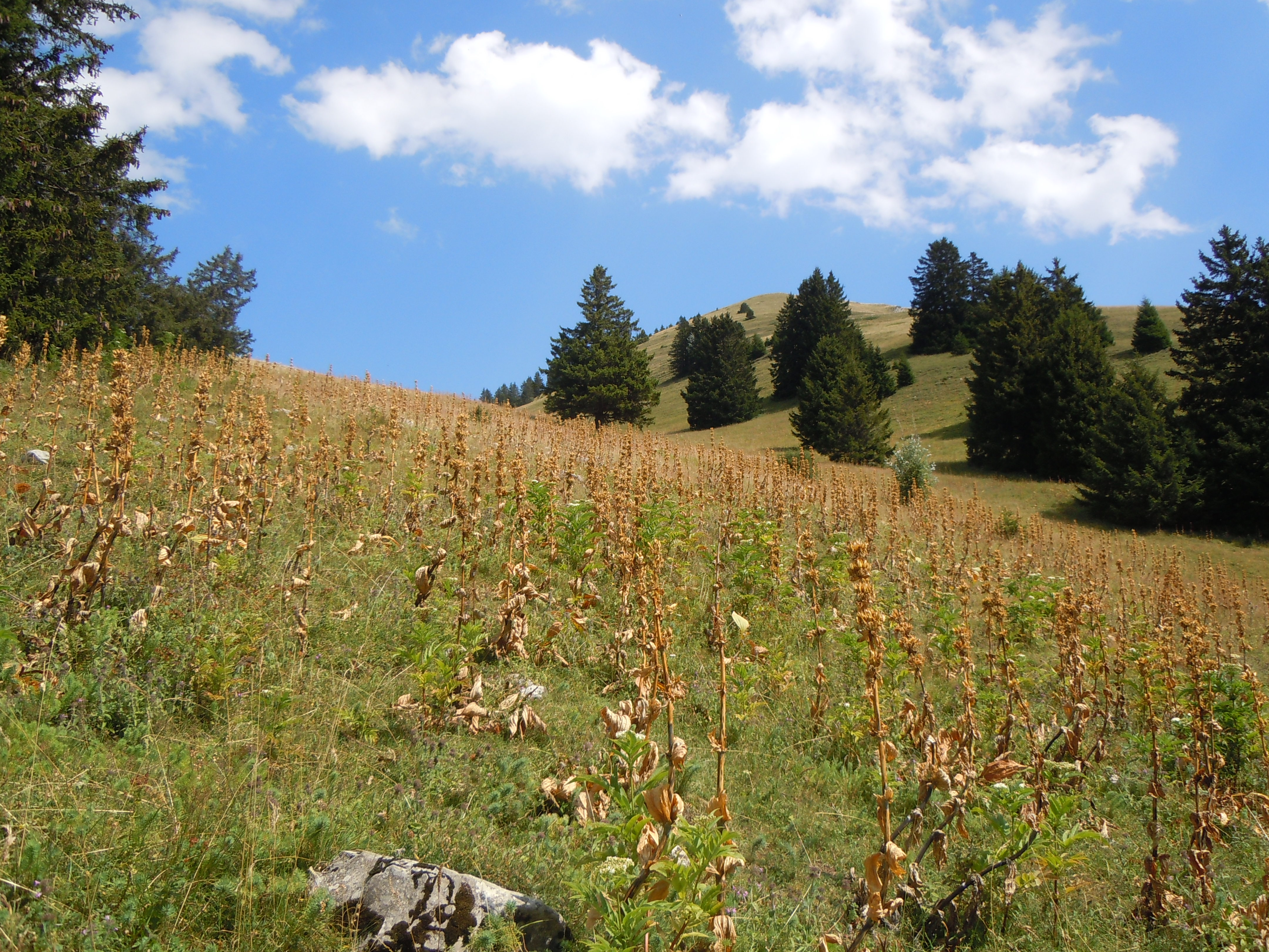 Prairie à gentianes jaunes au pied du Mont Pravouta - Isère - France